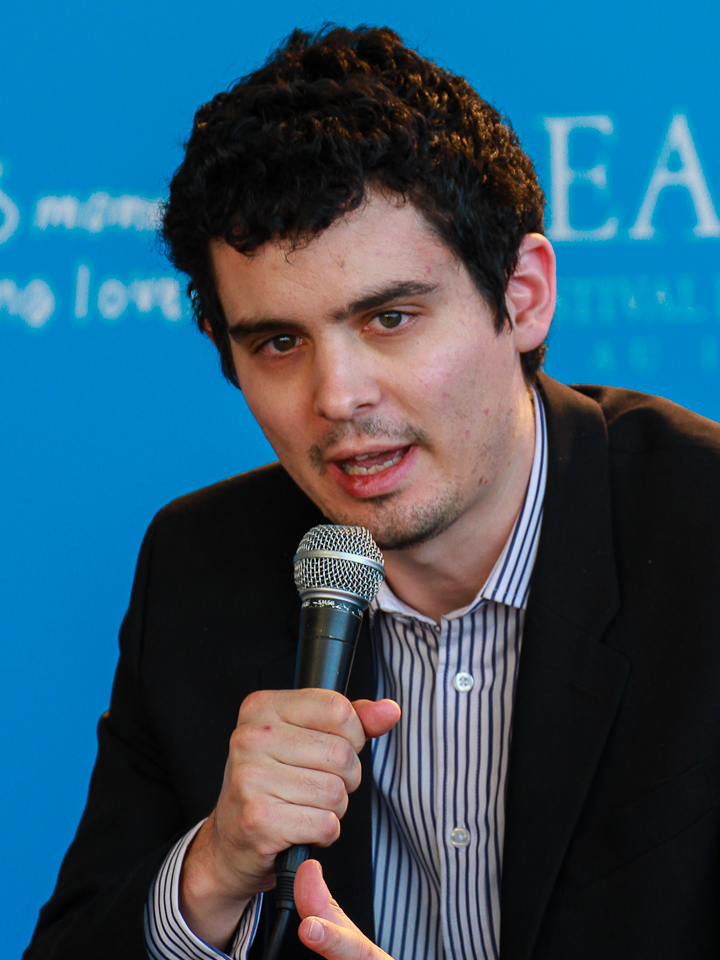 11 septembre 2014-deauville-9.jpg